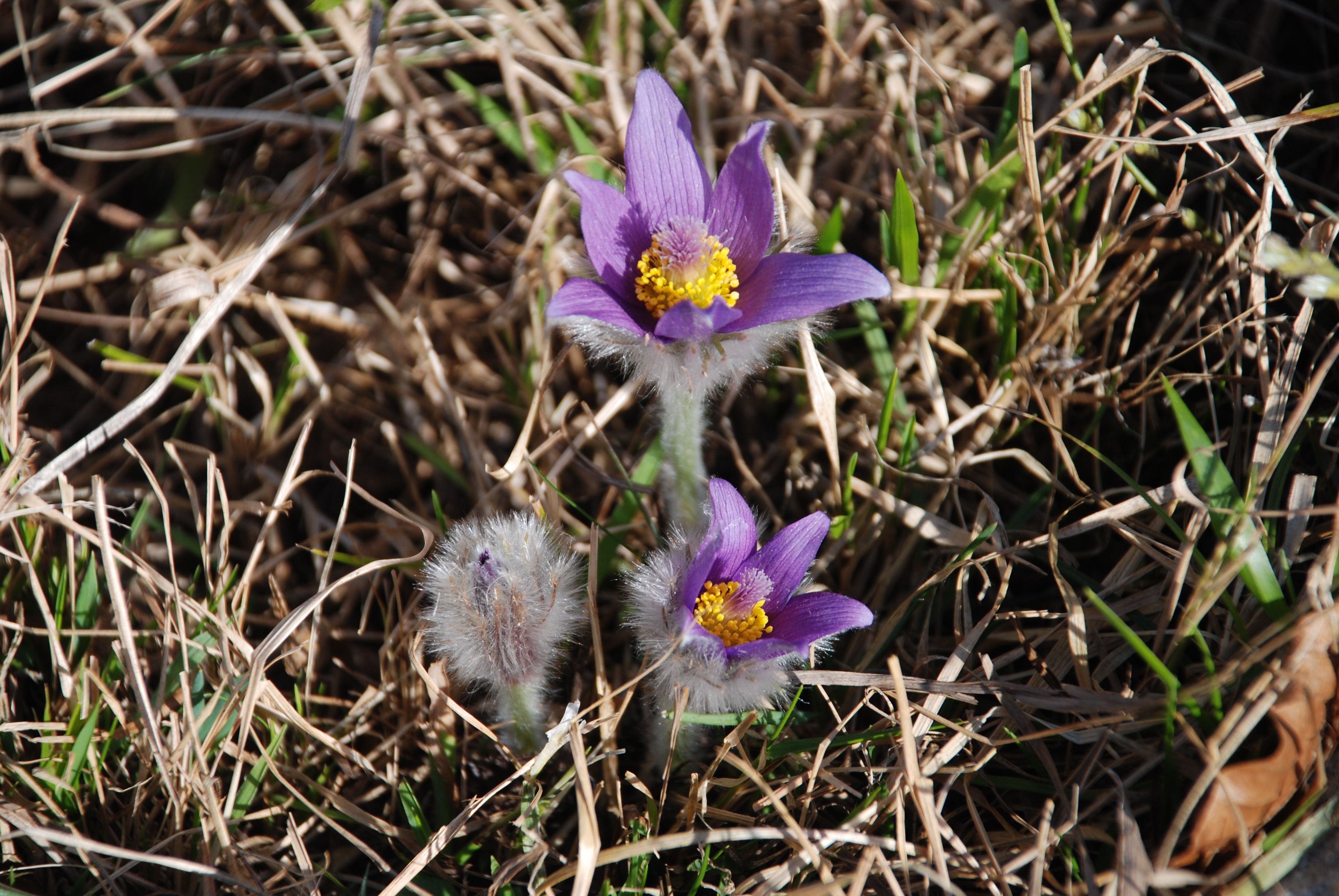 Velikonočnica (Pulsatilla grandis). Boč, Slovenia.